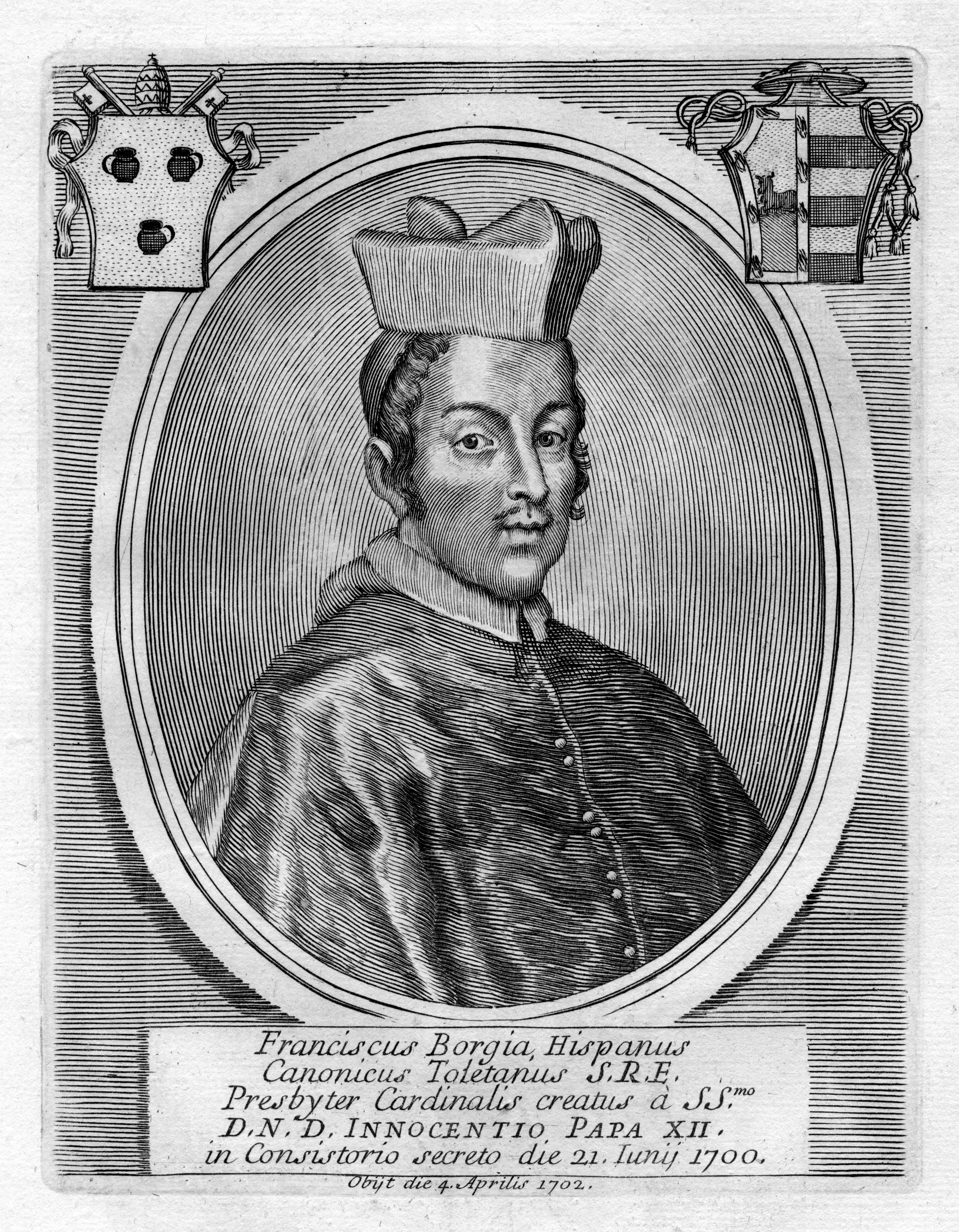 portrait gravé